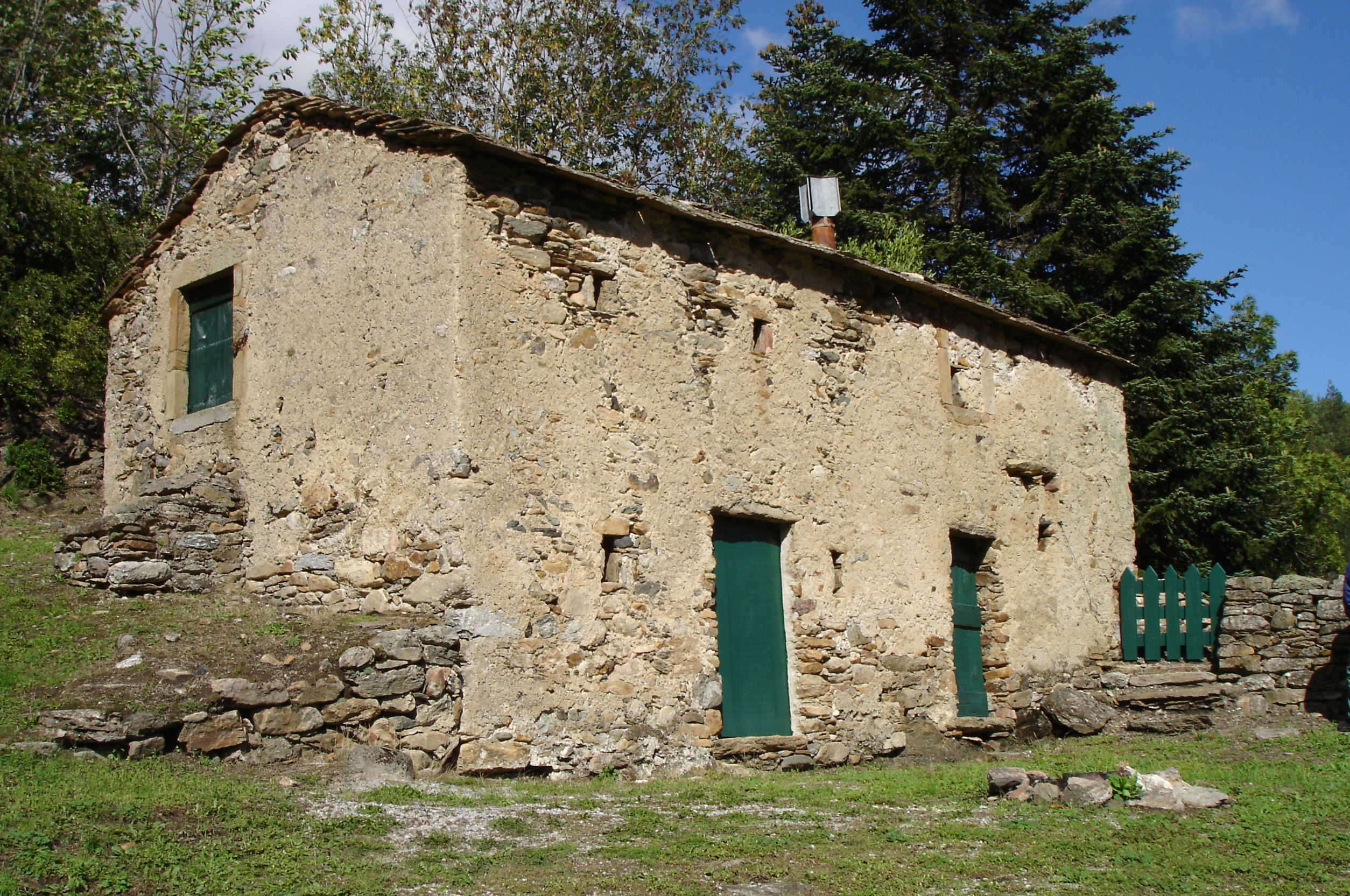 Castanet-le-Haut (Hérault) - Le «Secadou» en occitan (Séchoir à châtaignes en français).